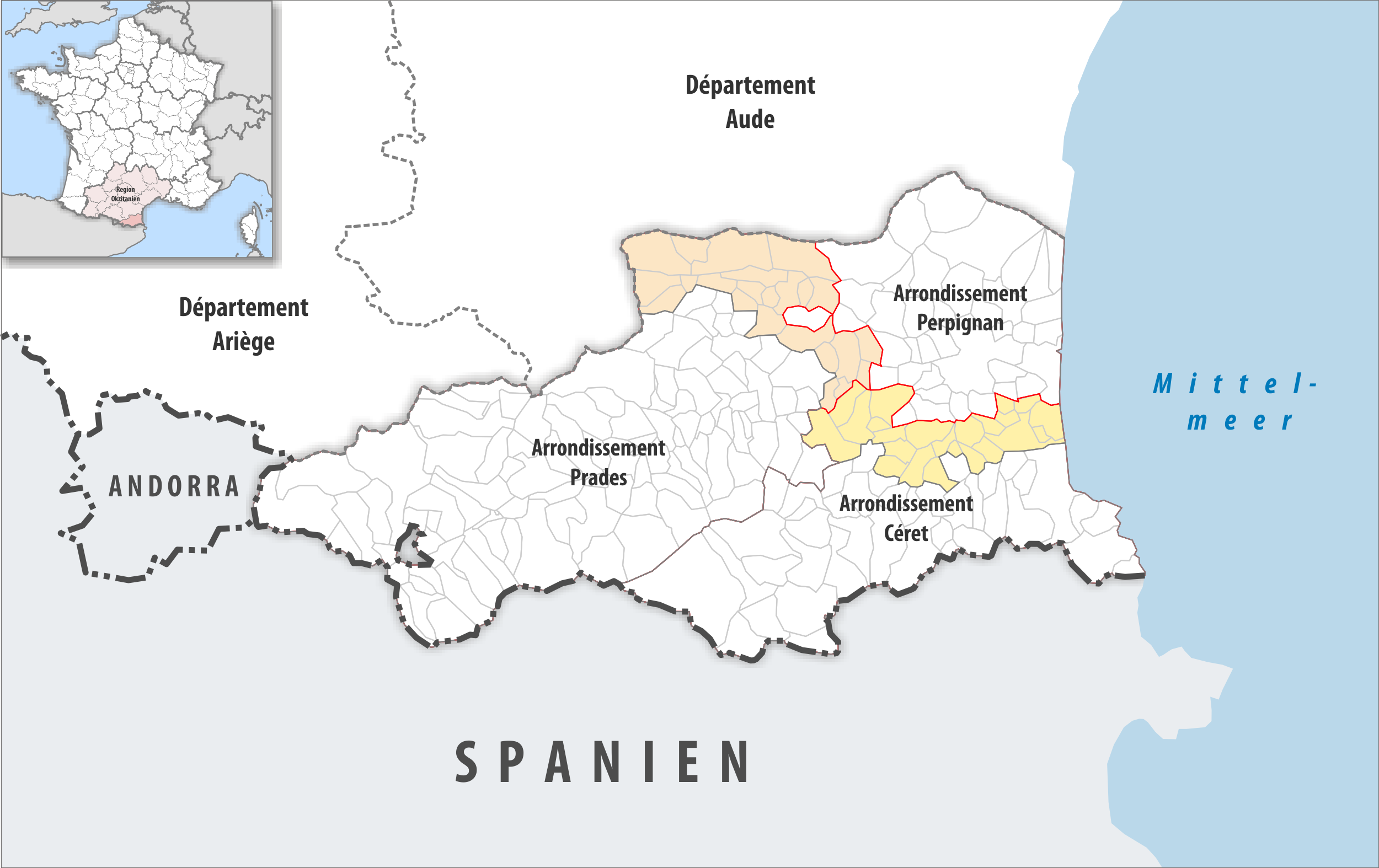 Arrondissements Anpassungen auf 2017 im Departement Pyrénées-Orientales